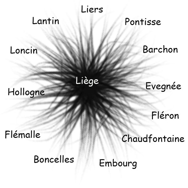 Emplacement des forts autour de Liège pendant la guerre 40-45